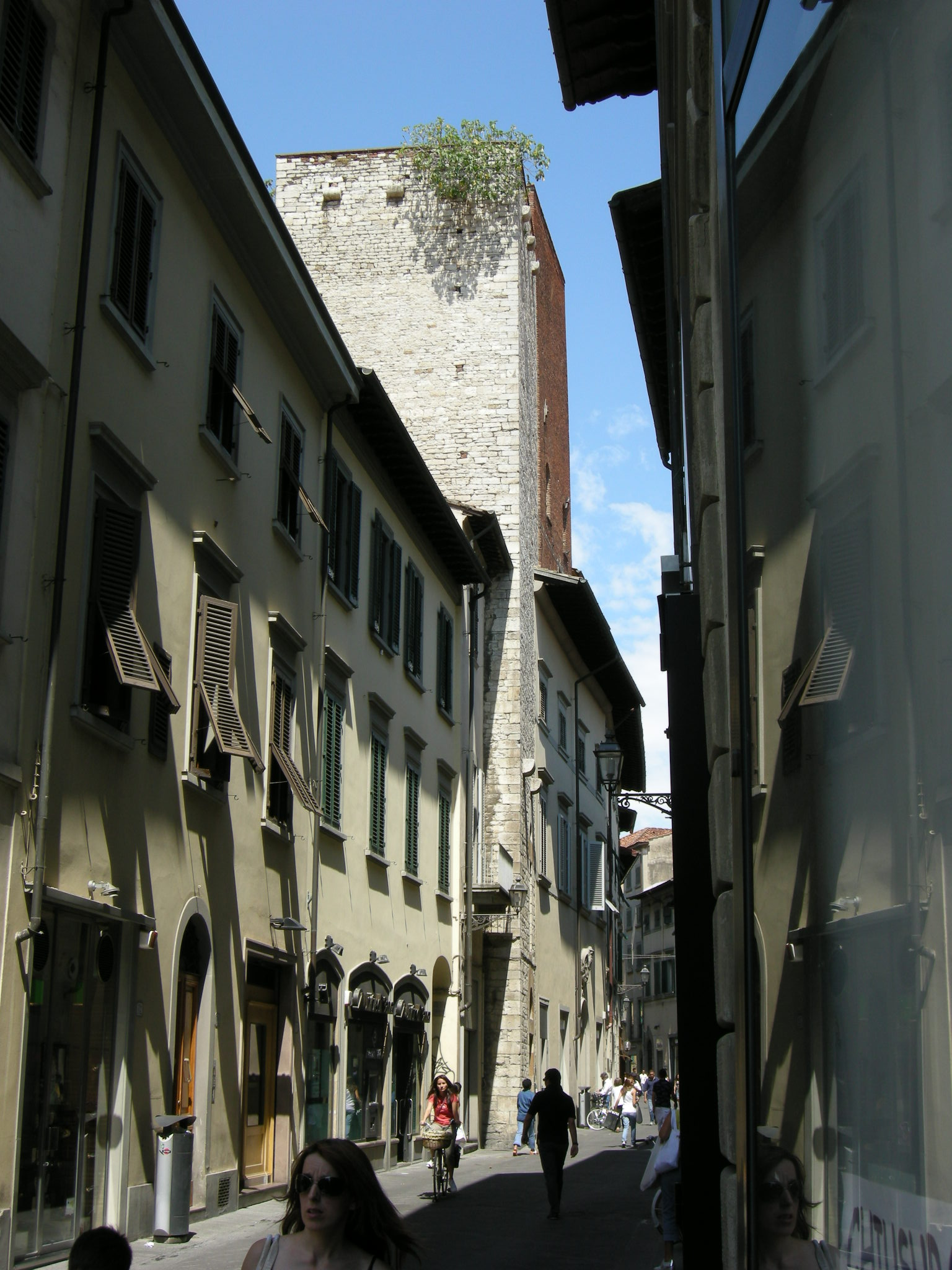 Torri di borgo al cornio, prato